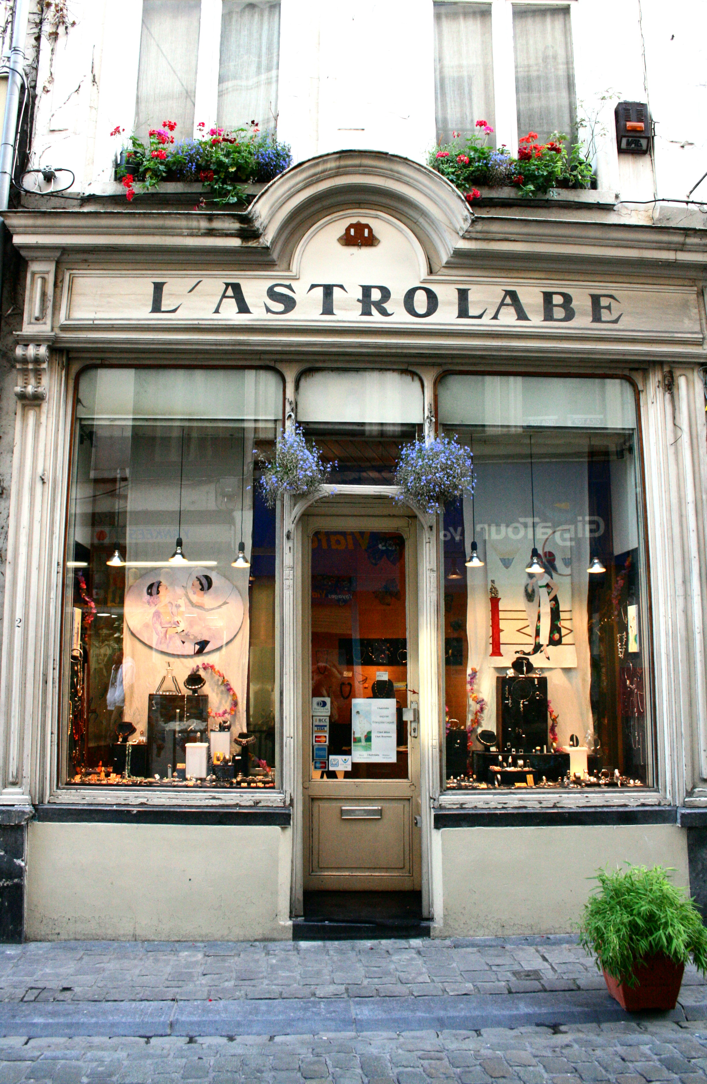 Rue des Éperonniers 2, Bruxelles, Belgique. Vitrine (1866)